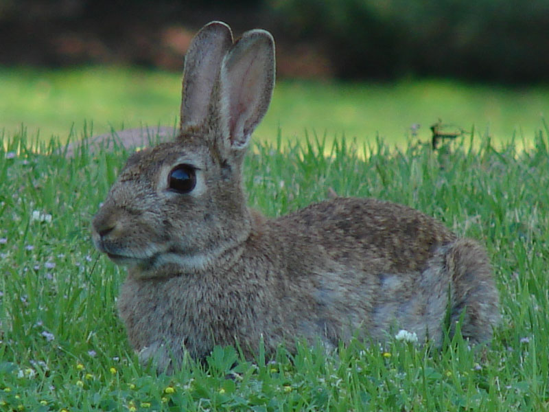 Oryctolagus cuniculus Conejo desconocido, averiguando a que tipo de familia pertenece.